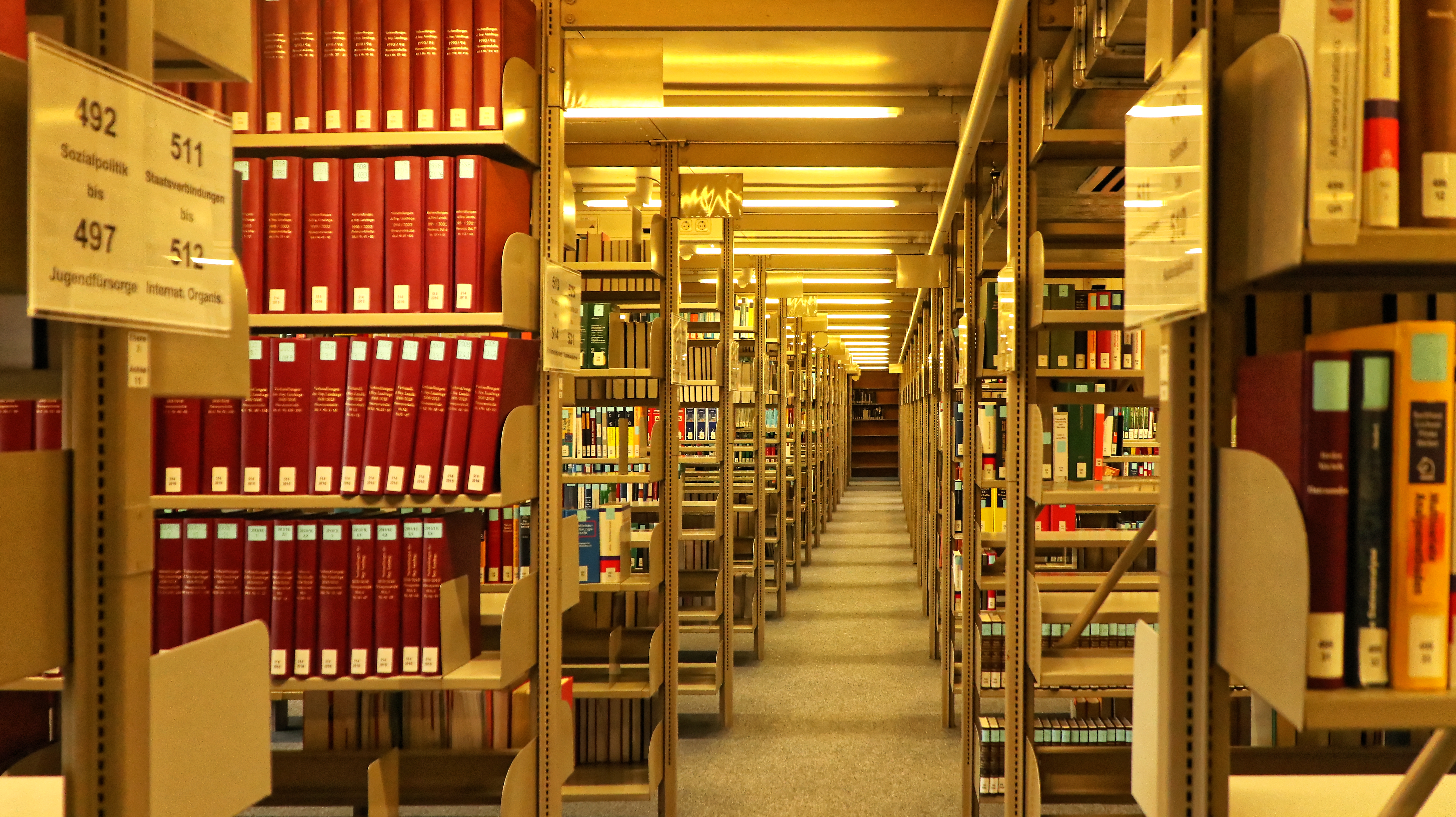 Bücherregale im Abholbereich der Bayerischen Staatsbibliothek im Bereich der Lesesäle